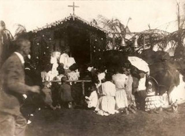 1ª missa Paróquia São Bento, 1929